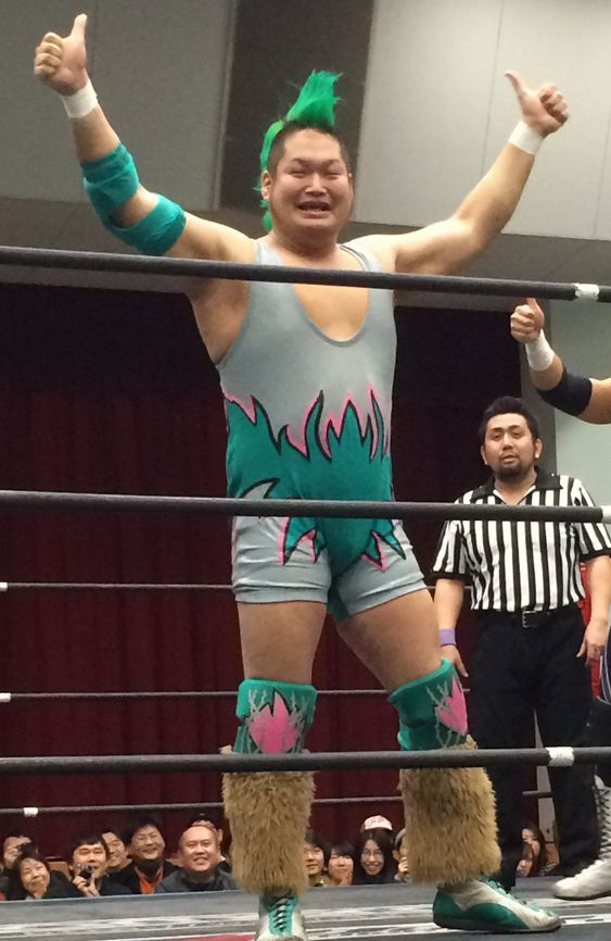 港区民ホール